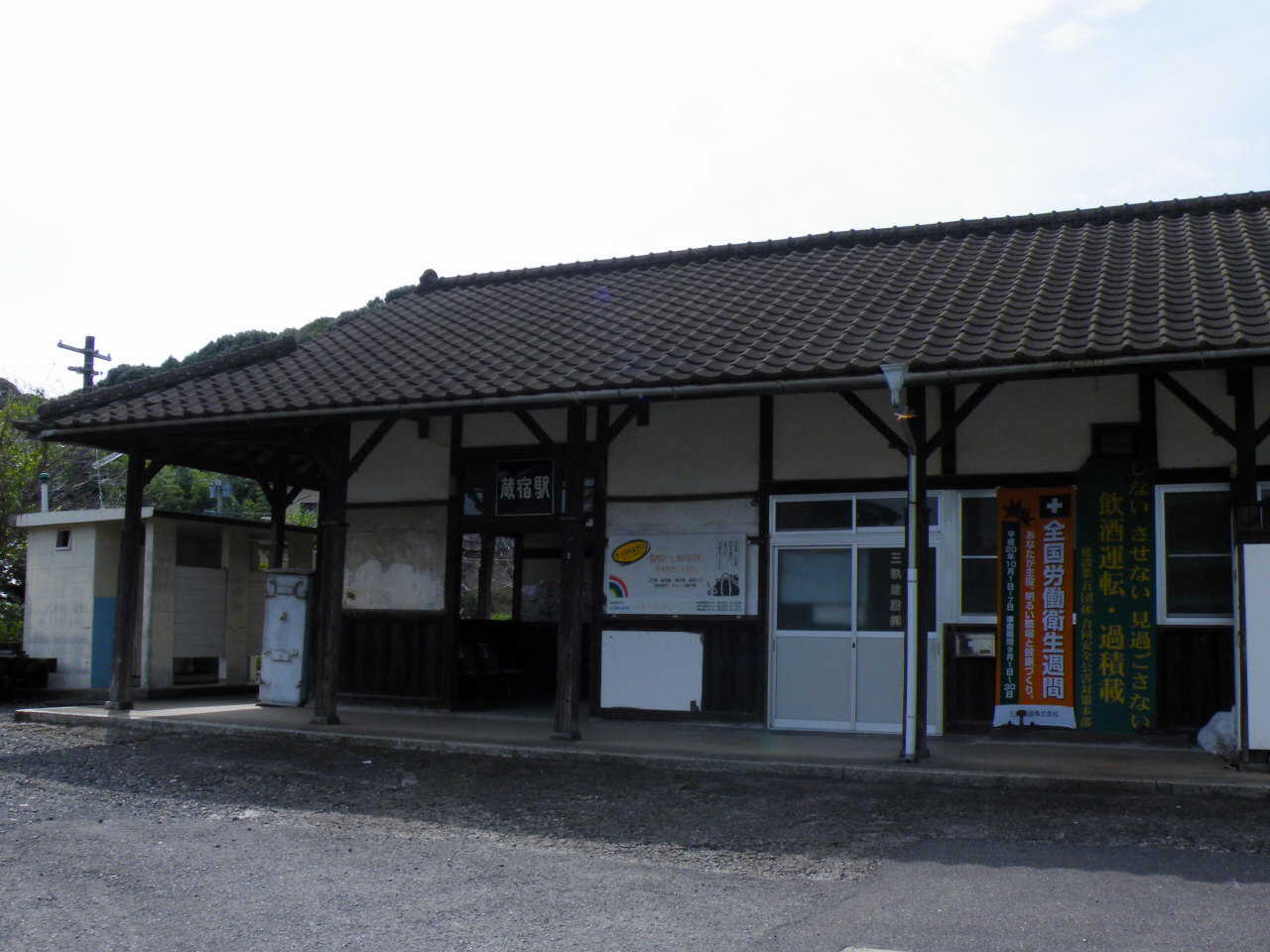 松浦鉄道西九州線蔵宿駅駅舎